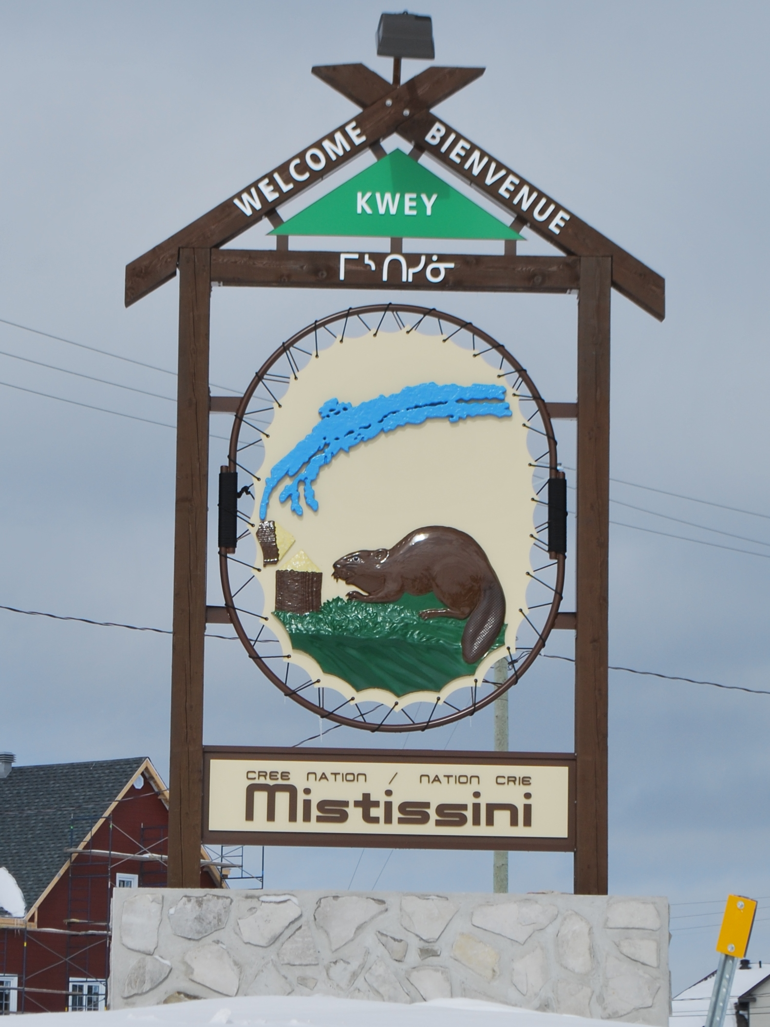 Mistissini. Entrée du village.